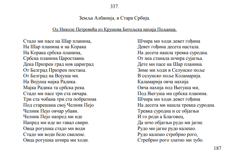 На слици се види страница из дела Милоша С. Милојевића који сведочи о постојању народних песама о челнику Пеји. Ове народне песме су заостатак сећања о античком народу Пејнаца и архонту тог народа Пејону по коме су добили име.